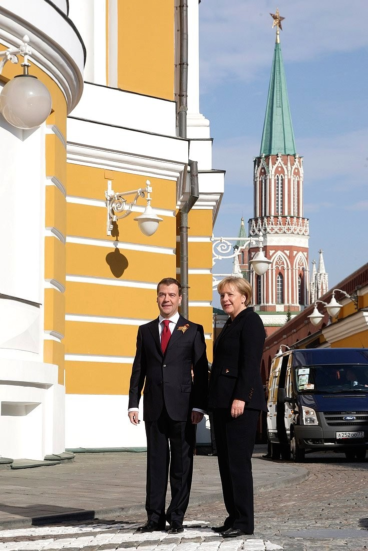 С Федеральным канцлером Германии Ангелой Меркель.